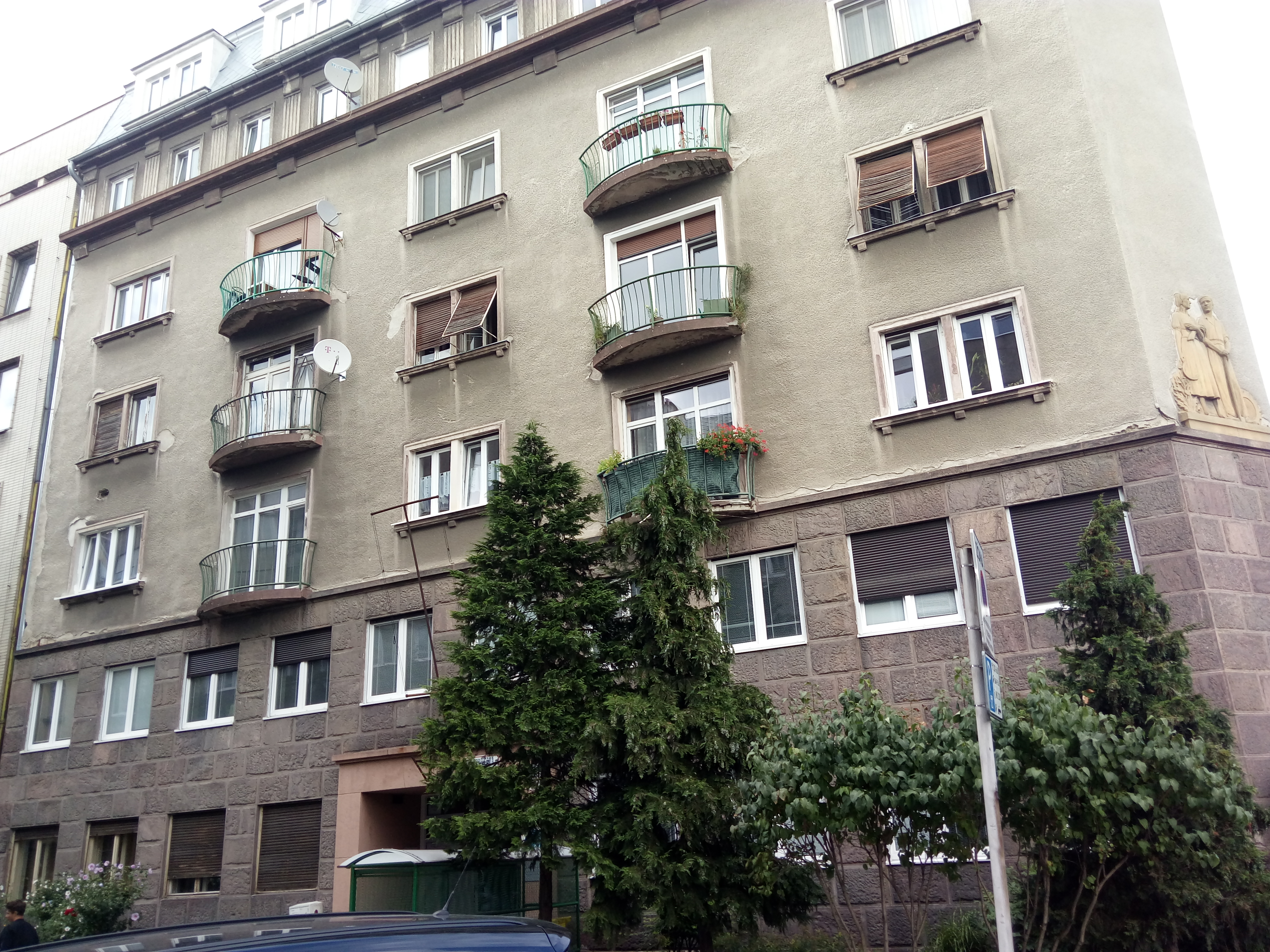 Bezručova 9, Staré Mesto, Bratislave